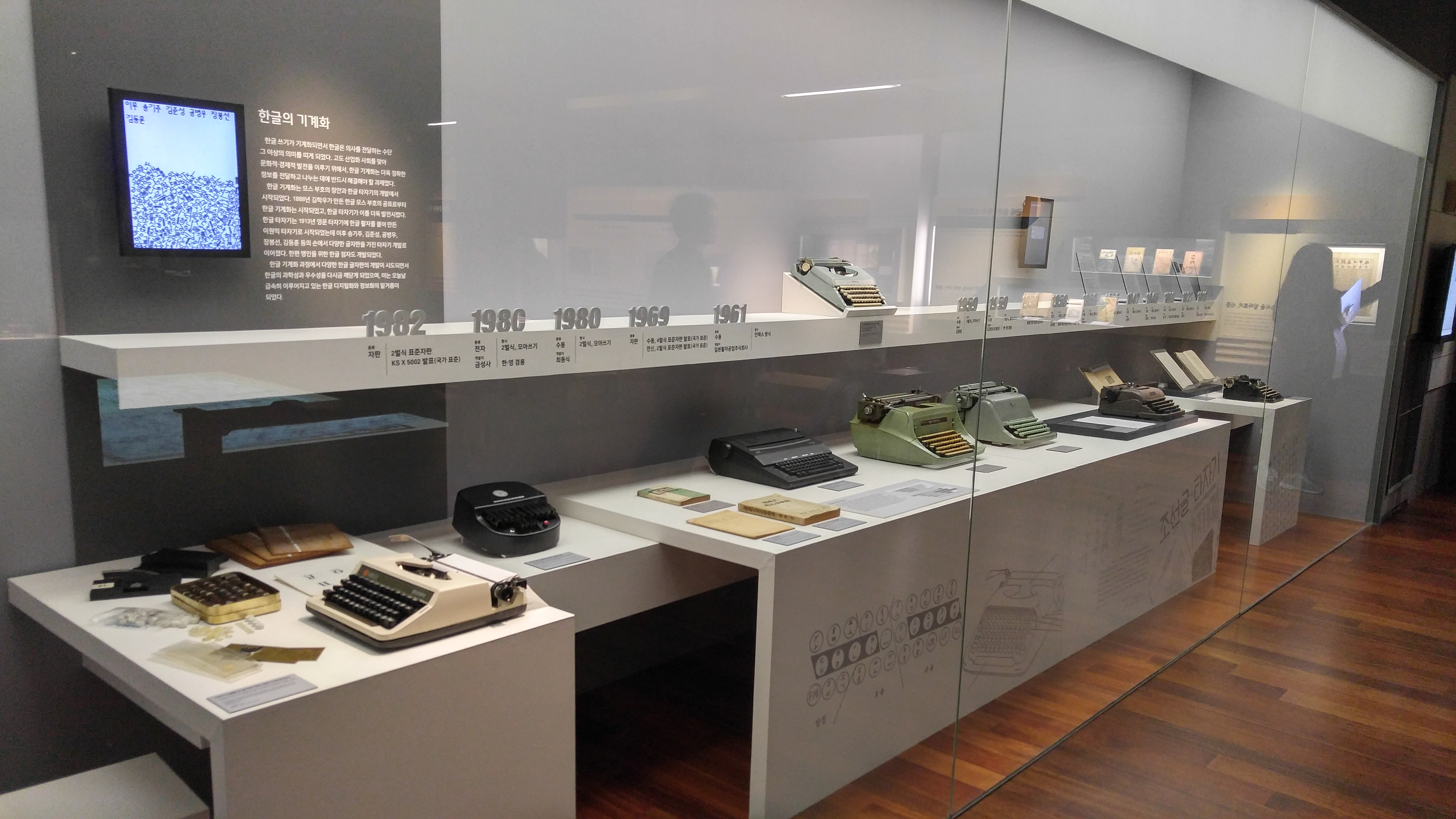 국립한글박물관 내부2